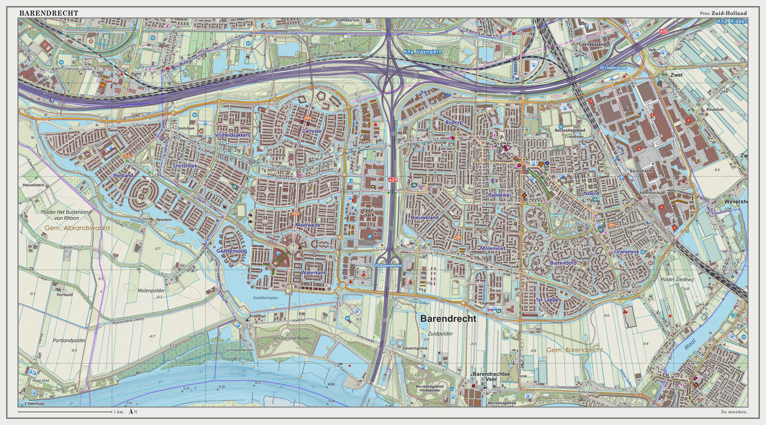 Topografische kaart van Barendrecht (woonplaats). Resolutie: 300 pixels/km. Kaartbeeld samengesteld uit de open geodata van de Top10NL en Top25namen (Basisregistratie Topografie, Kadaster), Creative Commons BY licentie. Gebouwvlakken uit open geodata BAG extract. Wegen uit de OpenStreetMap. Reliëfschaduw uit de Actuele Hoogtekaart AHN2. Samenstelling en kleurenschema: Jan-Willem van Aalst, met QGIS2. Zie ook de Legenda.